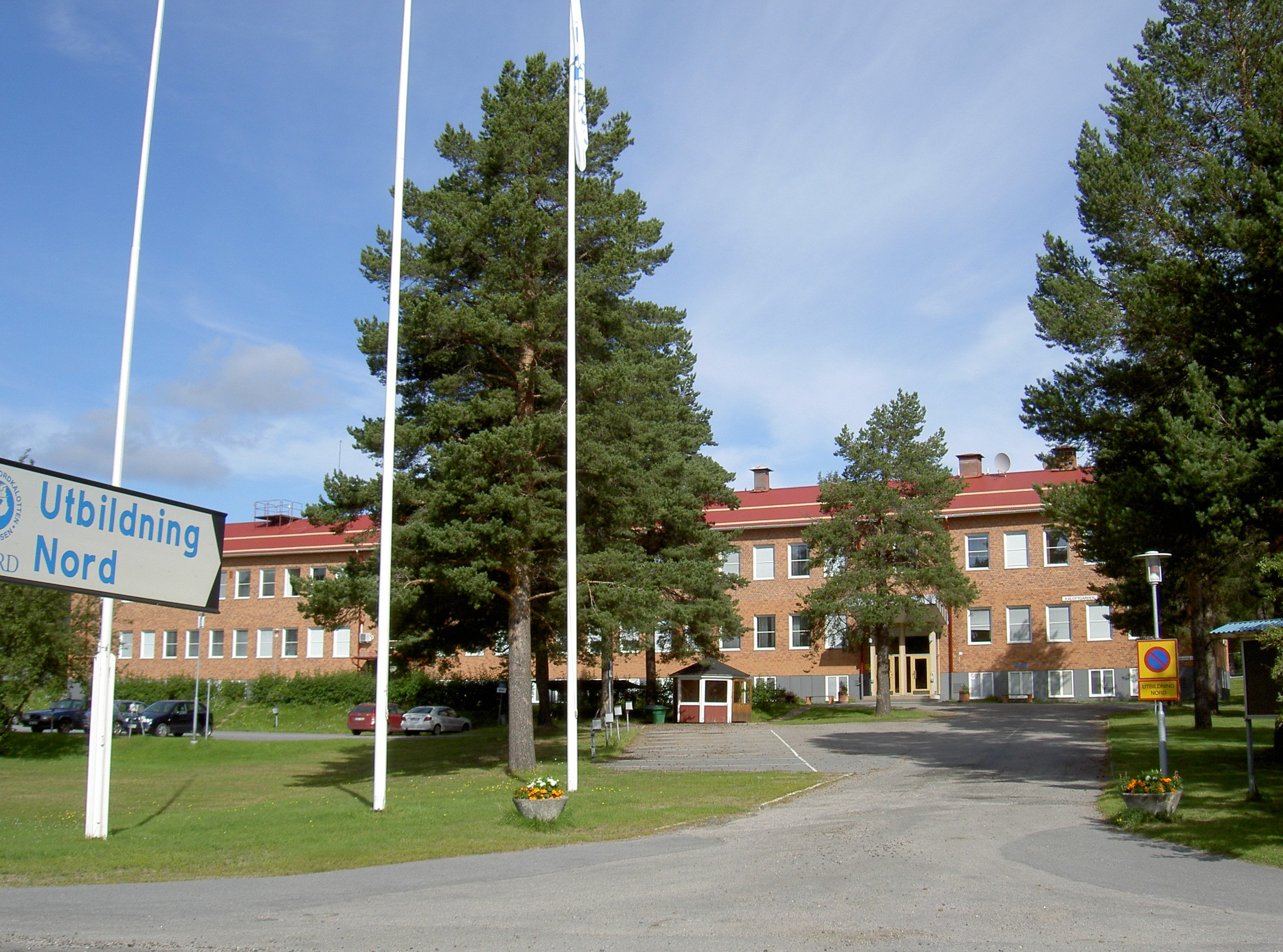 En av Utbildning Nords lokaler i Övertorneå.